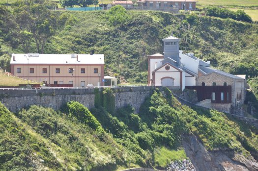 vista exterior del castillete restaurado actualmente